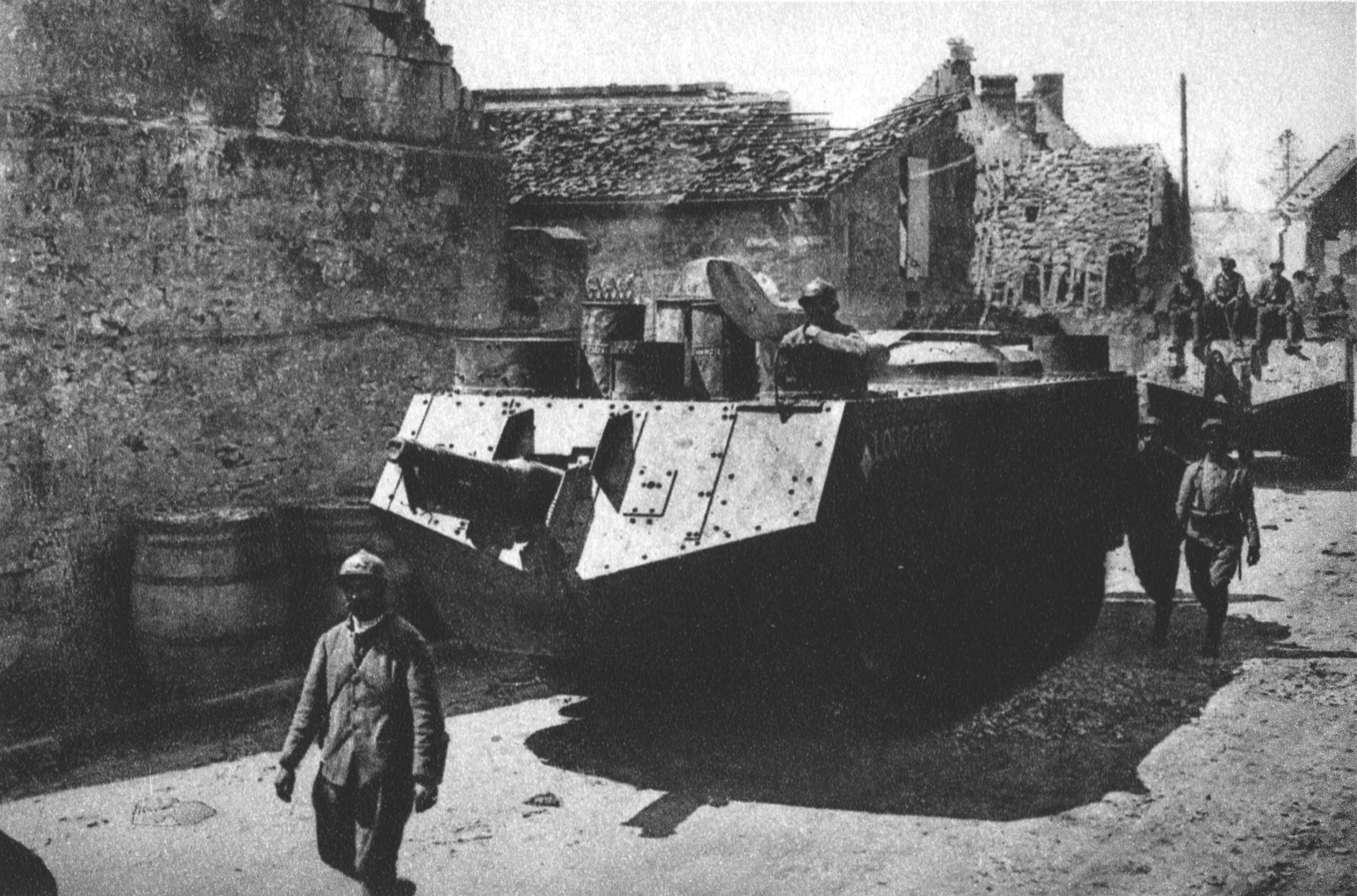 Sturmwagen wältzen sich durch die Ortschaft Dommiers (Aisne).